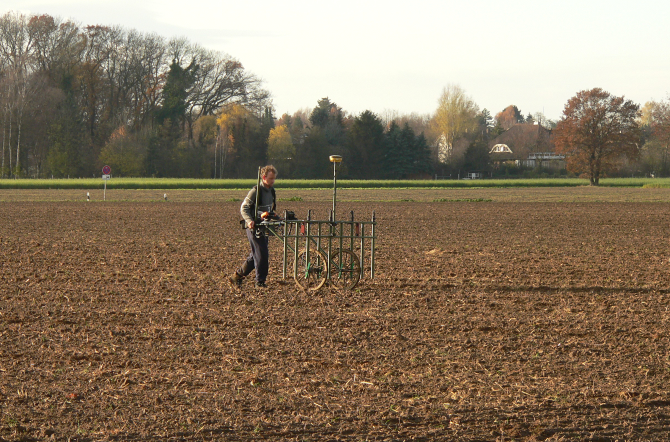 Römisches Marschlager Wilkenburg, geomagnetische Prospektion